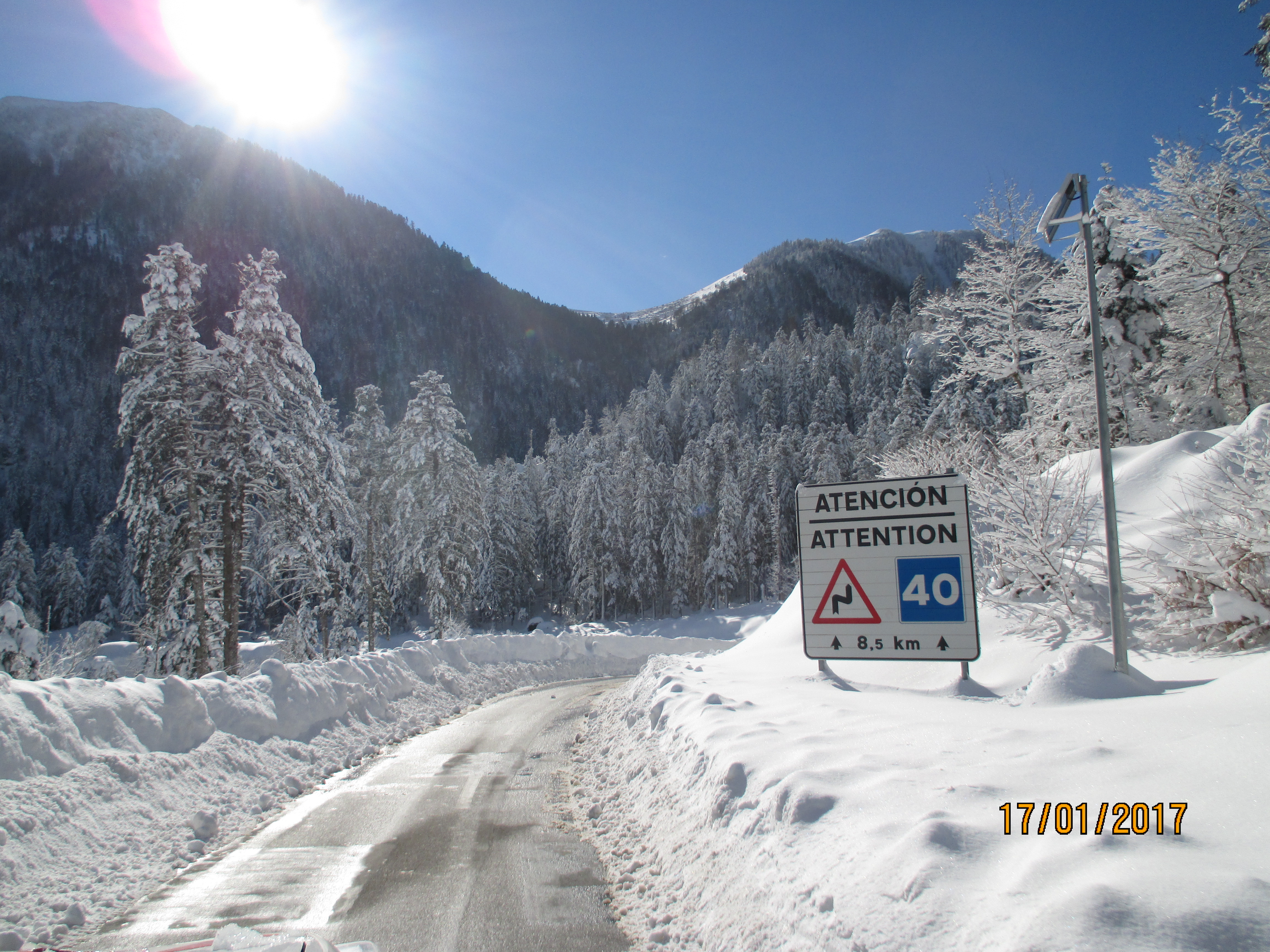 Vista del Puerto del Portillón o Col du Portillon en invierno